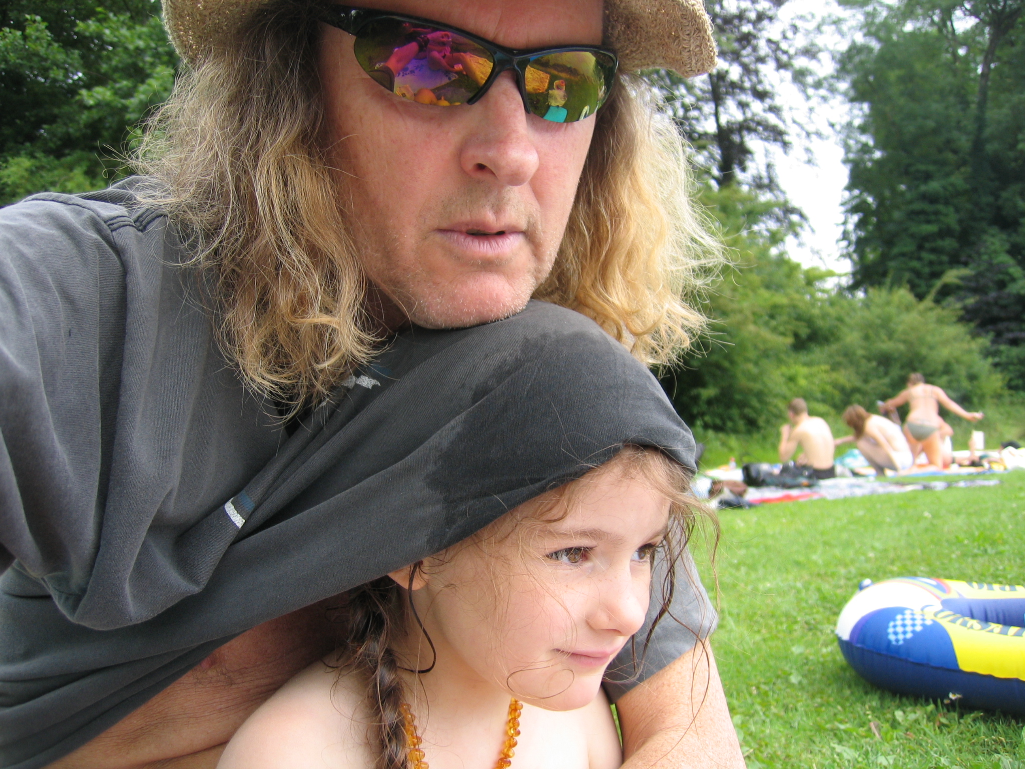 Von Rohr mit Tochter Jewel 2007